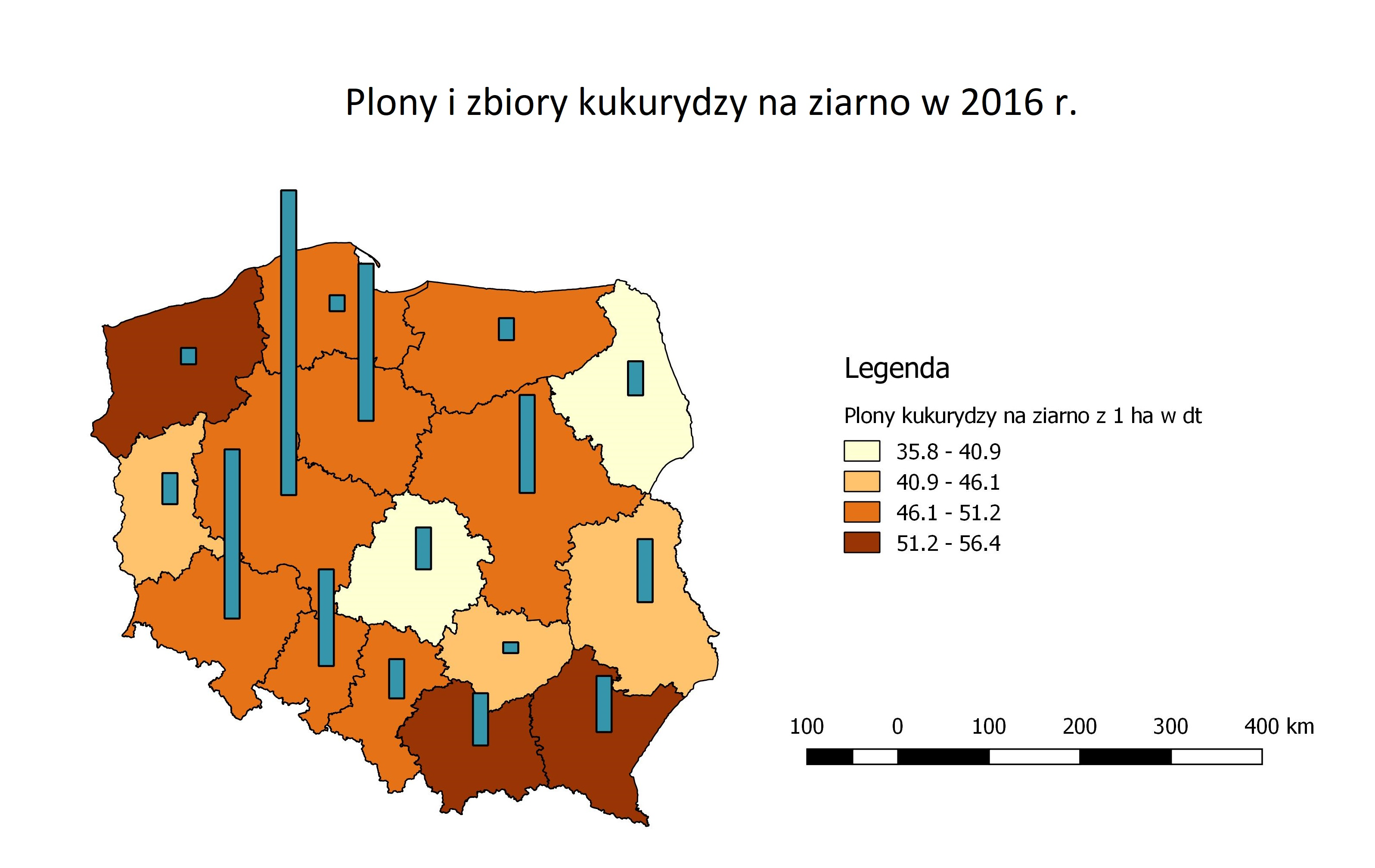 Kartogram przedstawiający Plony i zbiory kukurydzy na ziarno z 1 ha w dt w Polsce (2016 r.). Sporządzony na podstawie